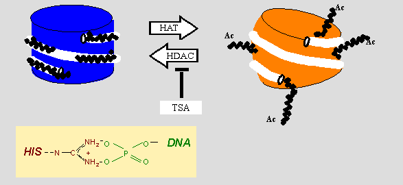 Nukleosom